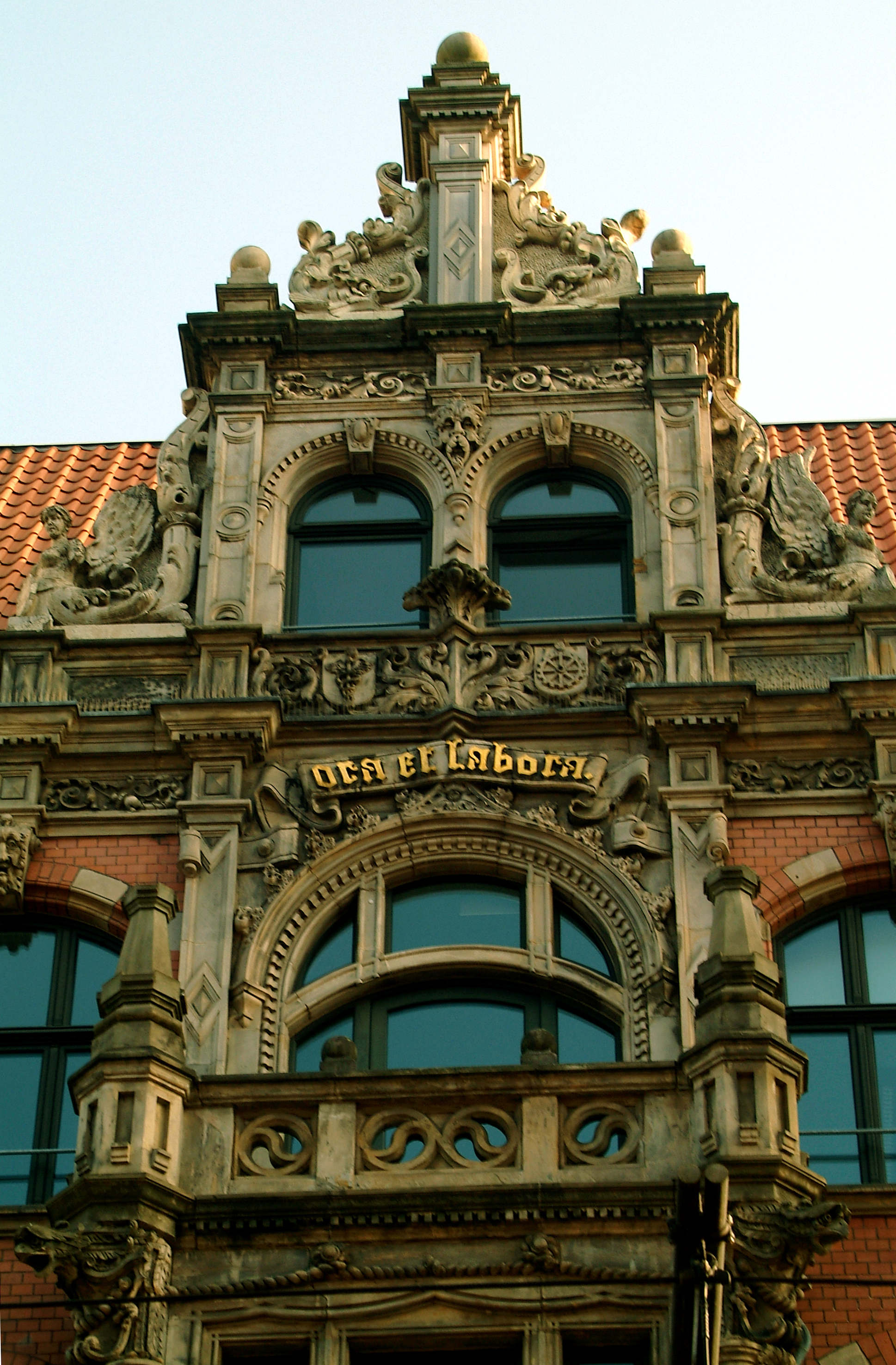 Details am Akademiehaus der Dr. Buhmann Schule Hannover Prinzenstraße 2